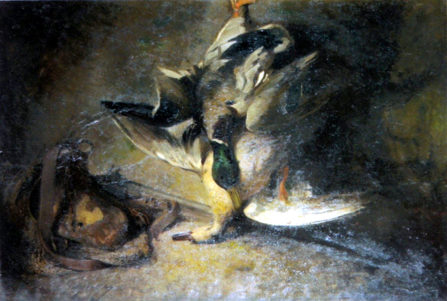 Natură moartă - rațe, ulei/pânză - Muzeul Național de Artă al României